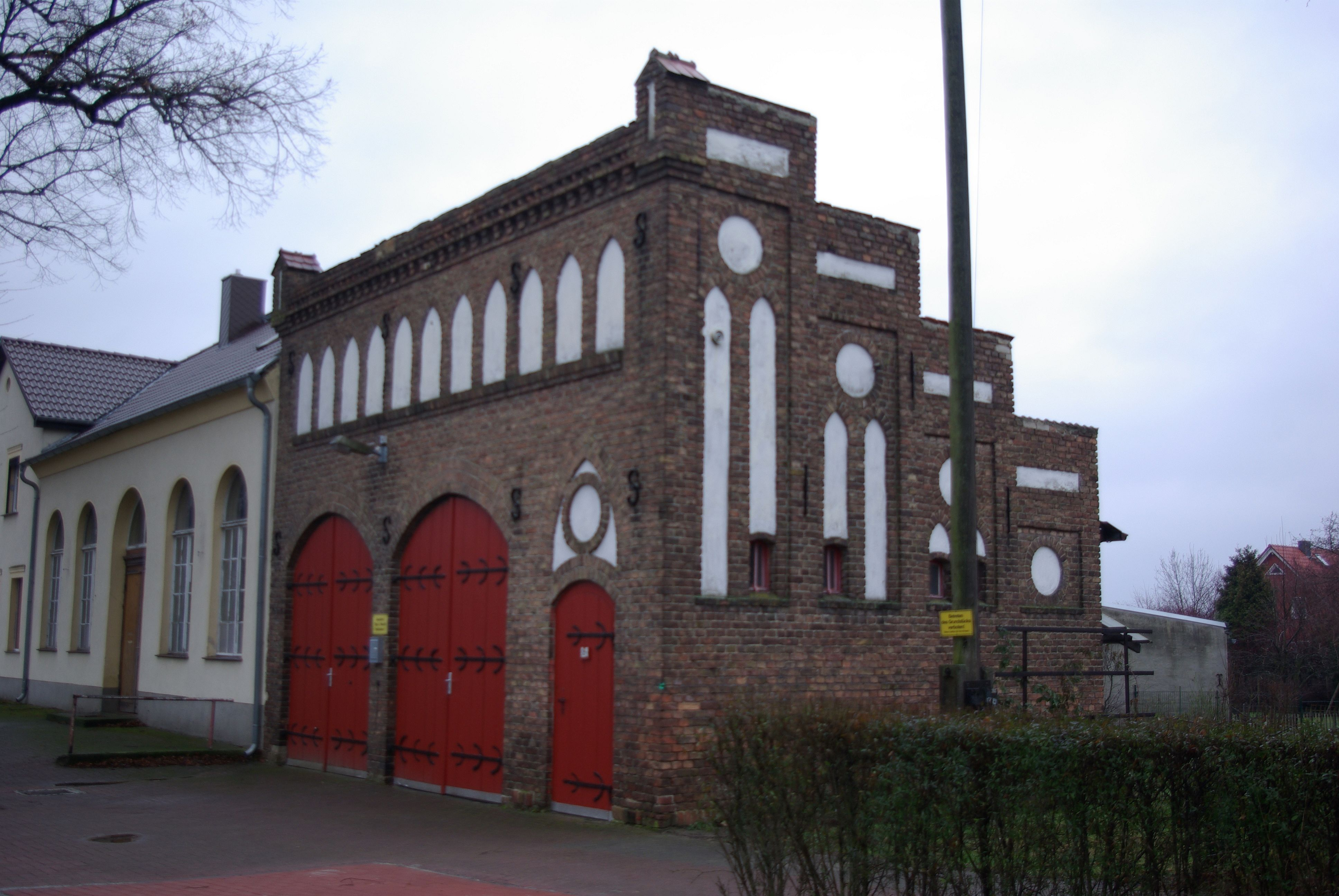 Mittenwalde (Mark) in Brandenburg. Das Spritzenhaus in der Dorfstraße 18 im Ortsteil Ragow steht unter Denkmalschutz.